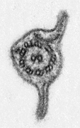 Electron micrograph of Chilomastix cuspidata (excavates, retortamonads). The "9+2" axoneme and the enclosing membrane can be seen, the flagellum has two vanes.